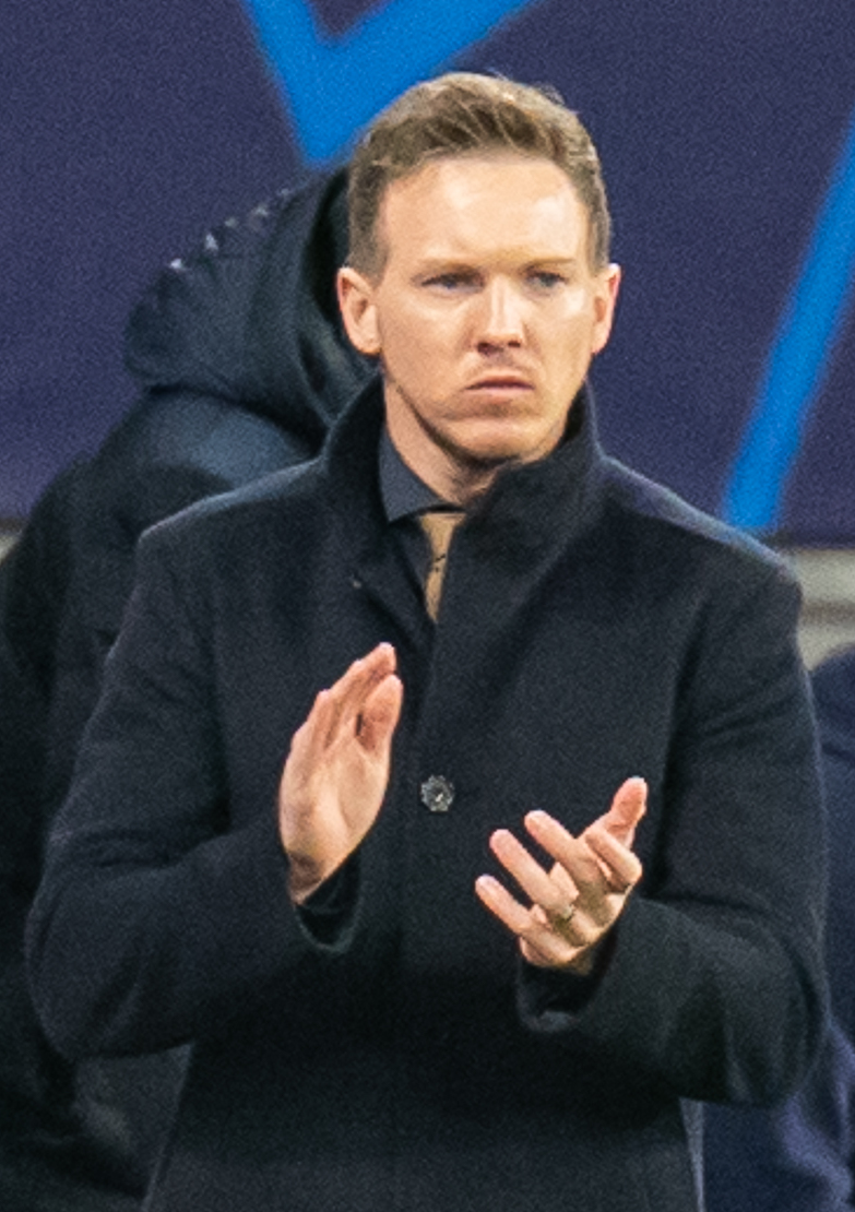 Fußball, Männer, UEFA Champions League Achtelfinale, RB Leipzig - Tottenham Hotspur; Julian Nagelsmann (RB Leipzig, Trainer, head coach) applaudiert zum Tor durch Marcel Sabitzer (RB Leipzig, 7)